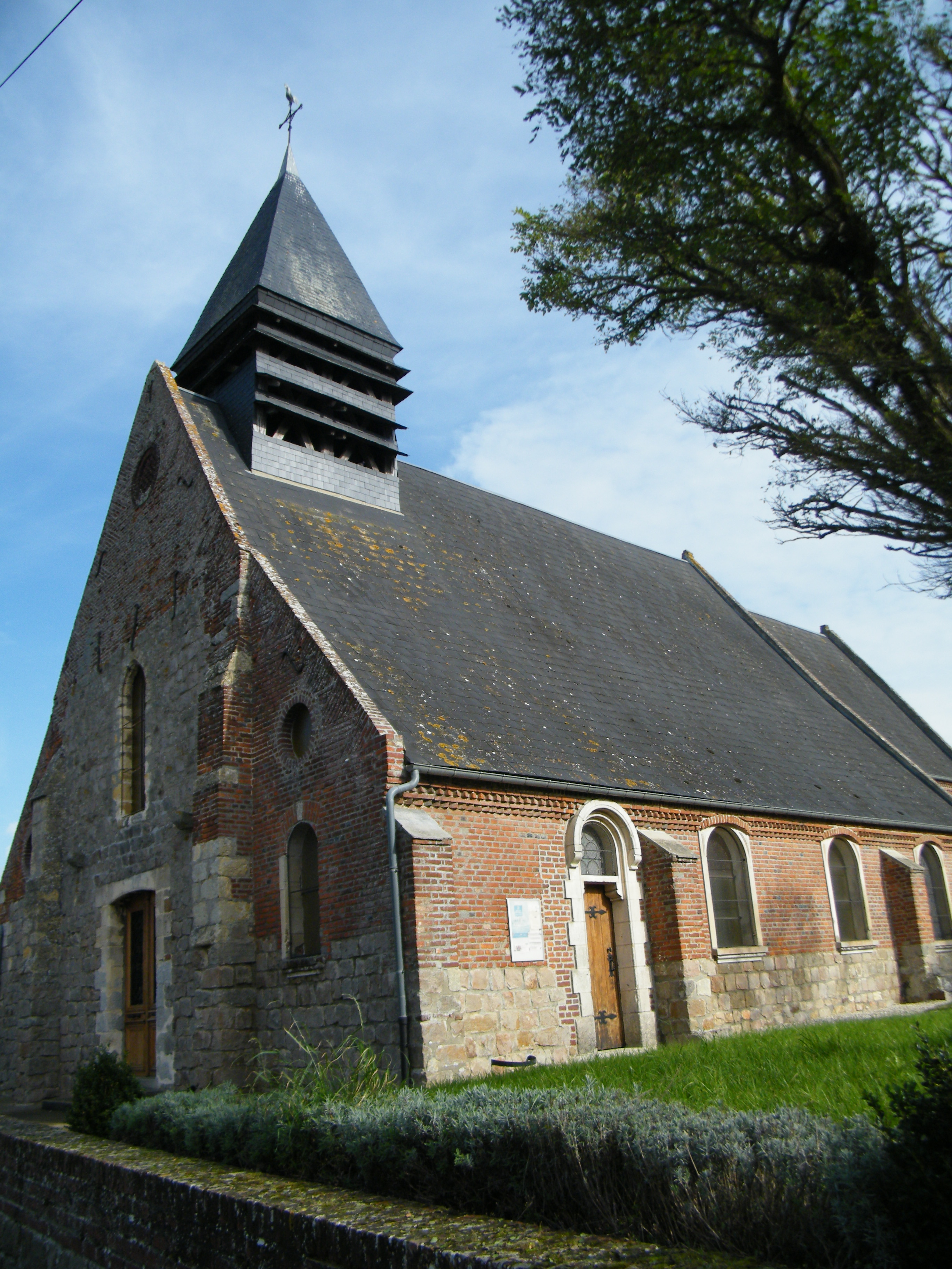 église.